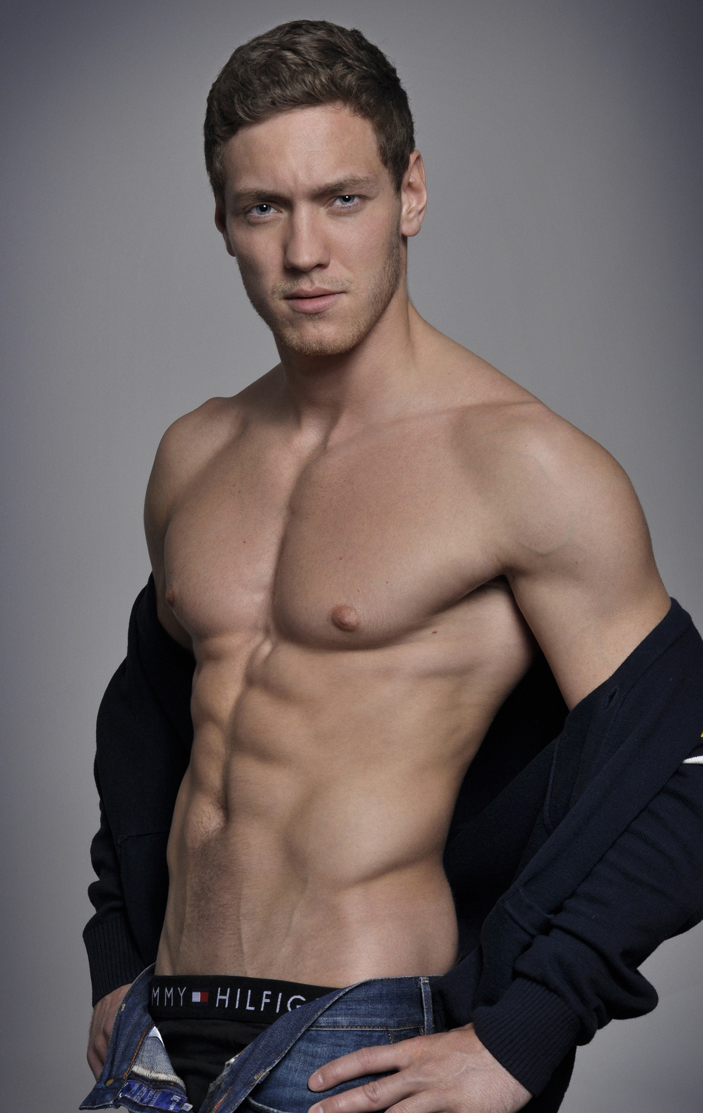 Miroslav Dubovický - model, sportovec, reklamní herec